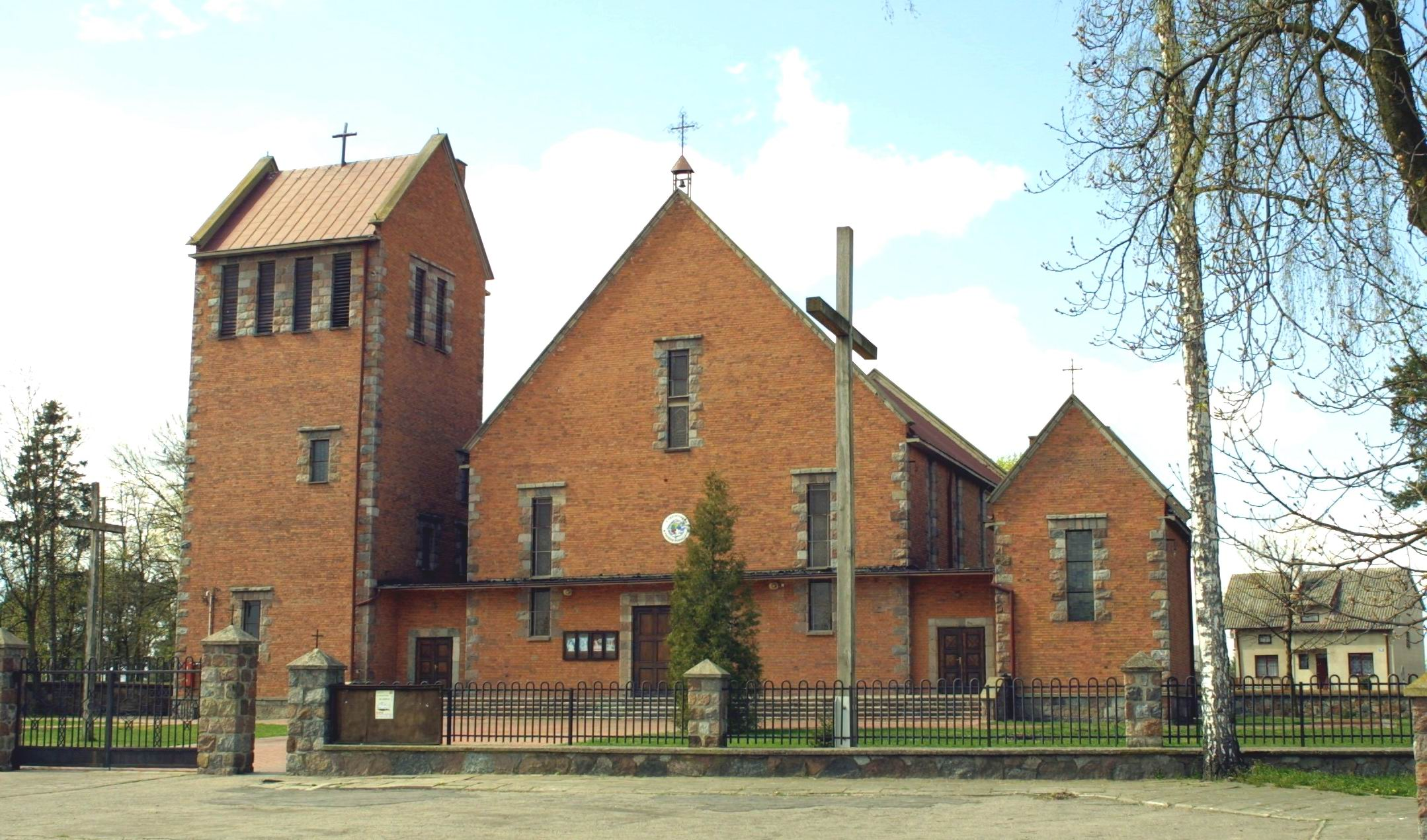 Sypniewo. Kościół pw. św. Maksymiliana Marii Kolbego zbudowany 1969-1974